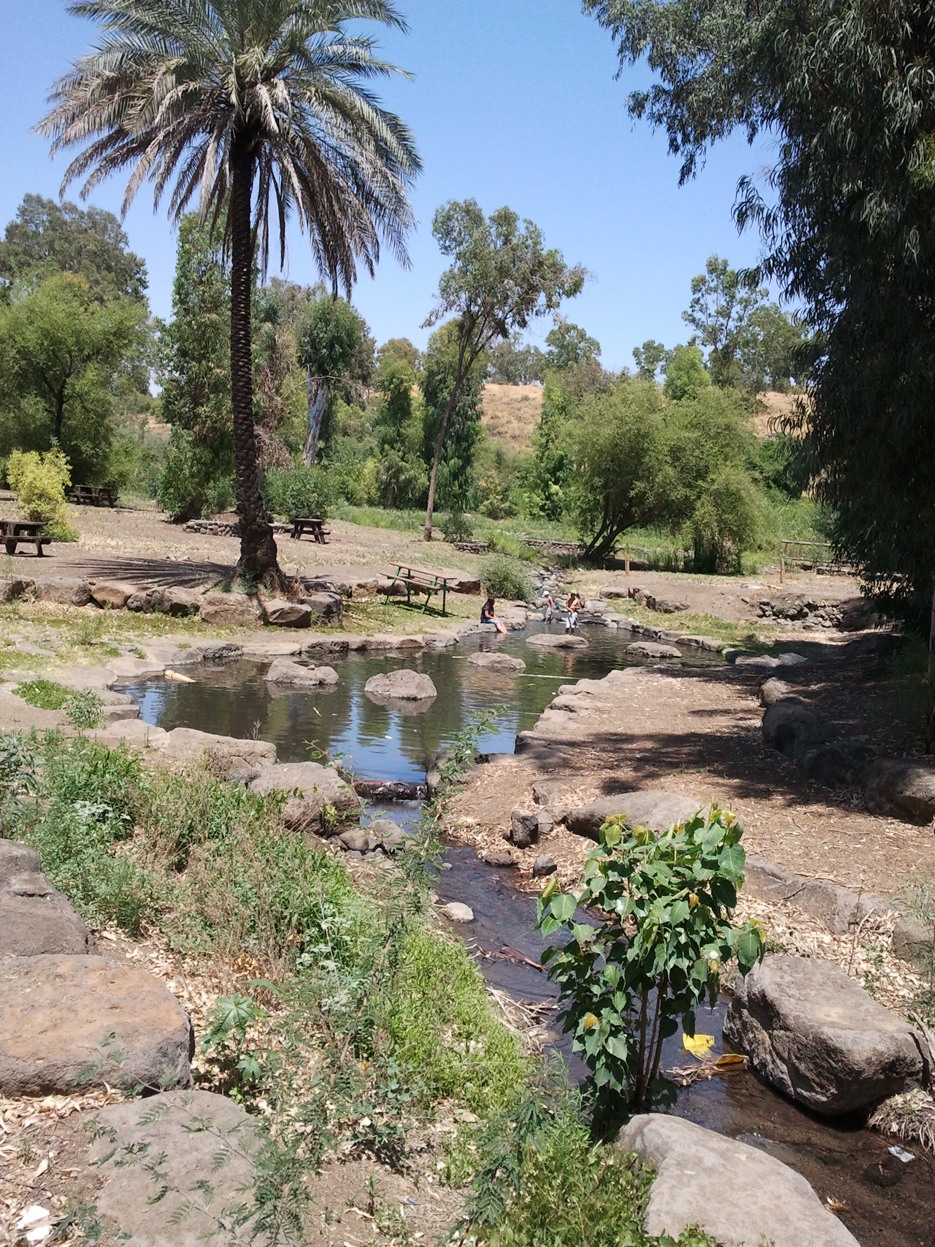 Category:Jordan River park, northern from Sea of Galilee, Israel פארק הירדן שוכן בצפונה של הכנרת. בתחום הפארק נמצא תל בית צידה בריכה ממי מעיין משפע